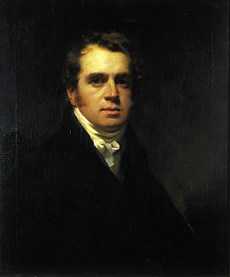 Francis Horner (1778-1817)